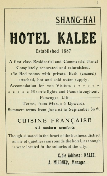 Advertisement